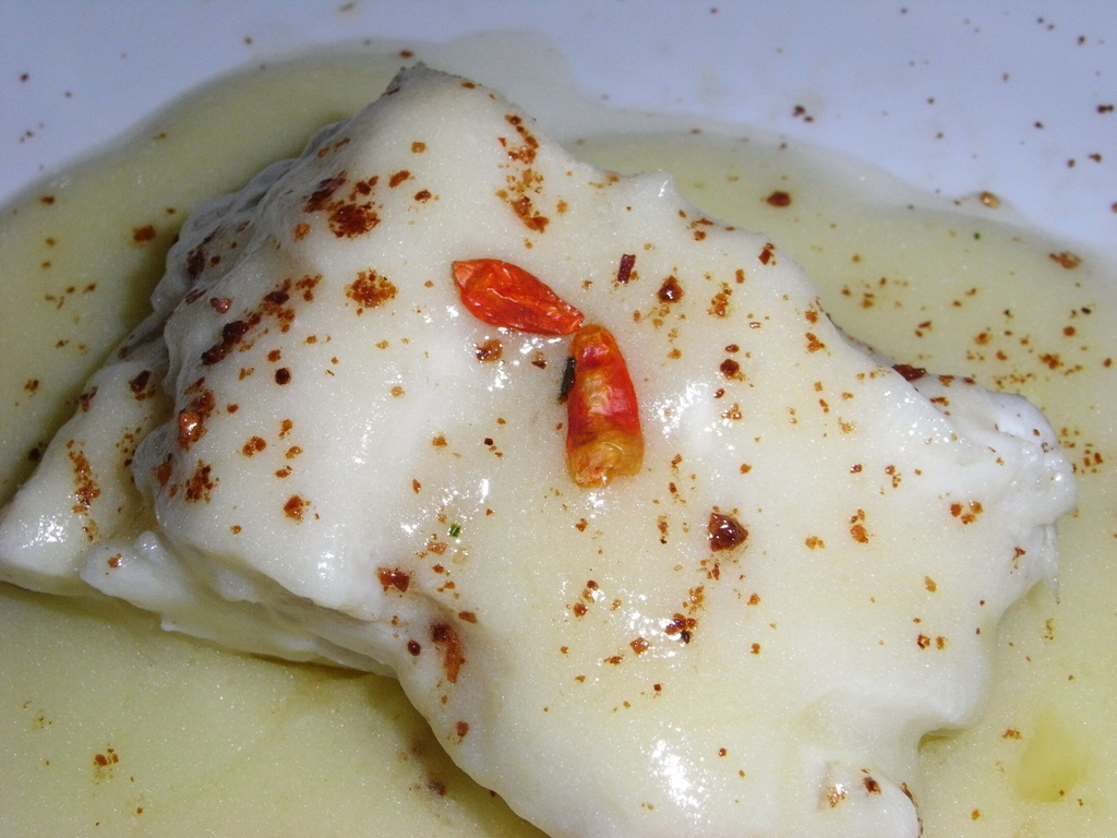 Ver artículo en mi Blog en Enlace See post in My blog at Link